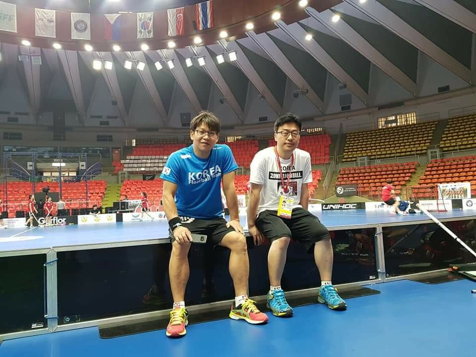 대한플로어볼협회 김황주 이사 & 강금성 사무처장